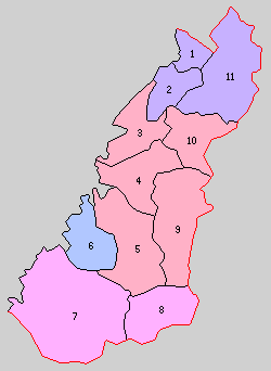 熊本県葦北郡の町村制時点の町村。